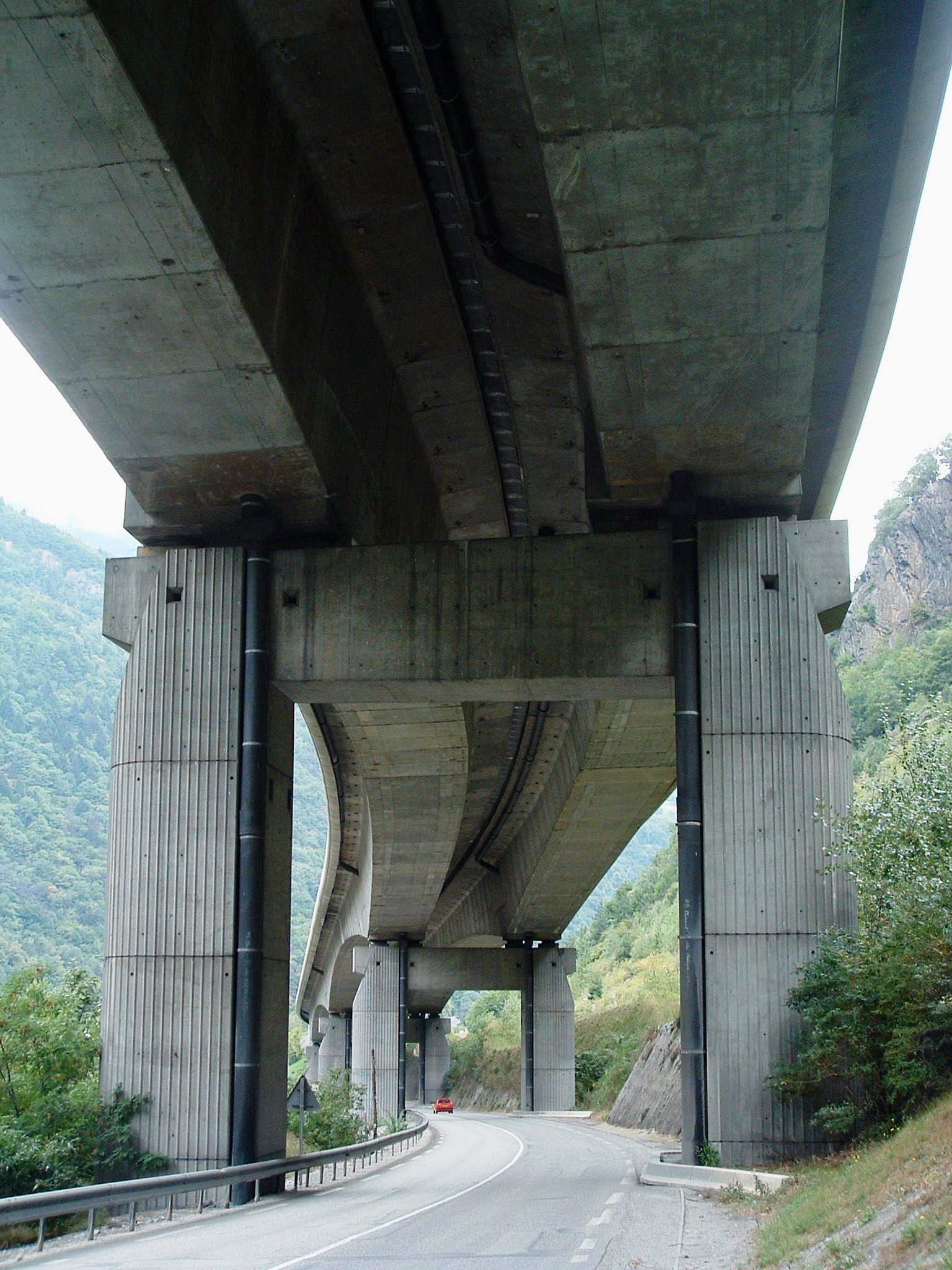 La Léchère - RN90 - Viaduc du Champ-du-Comte